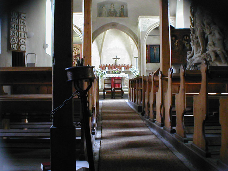 Innenansicht der Burgkapelle von Burg Guttenberg (Haßmersheim) mit hist. Gemmingen-Epitaph